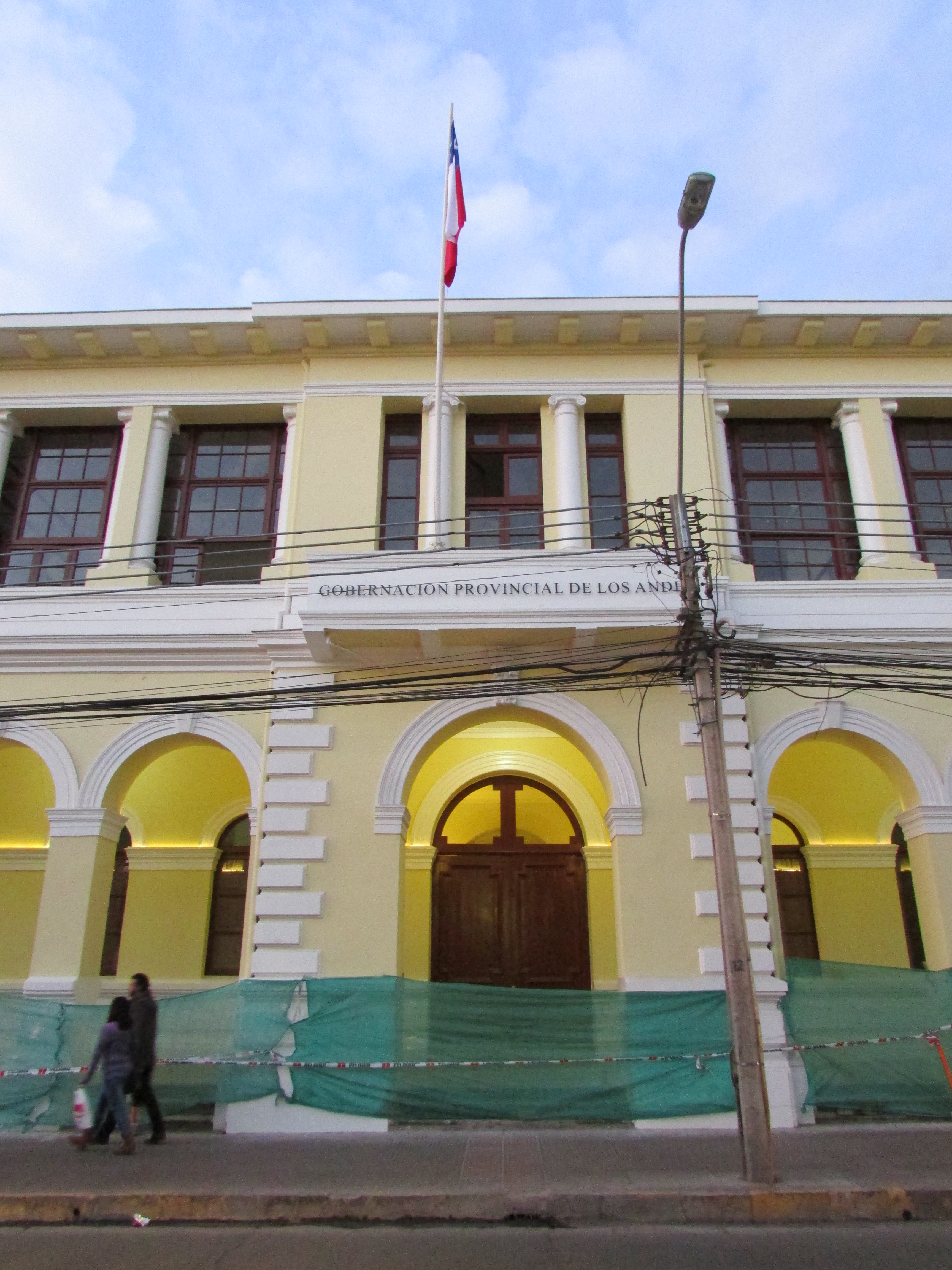 Edificio de la Gobernación Provincial de Los Andes This is a photo of a national monument in Chile: 443